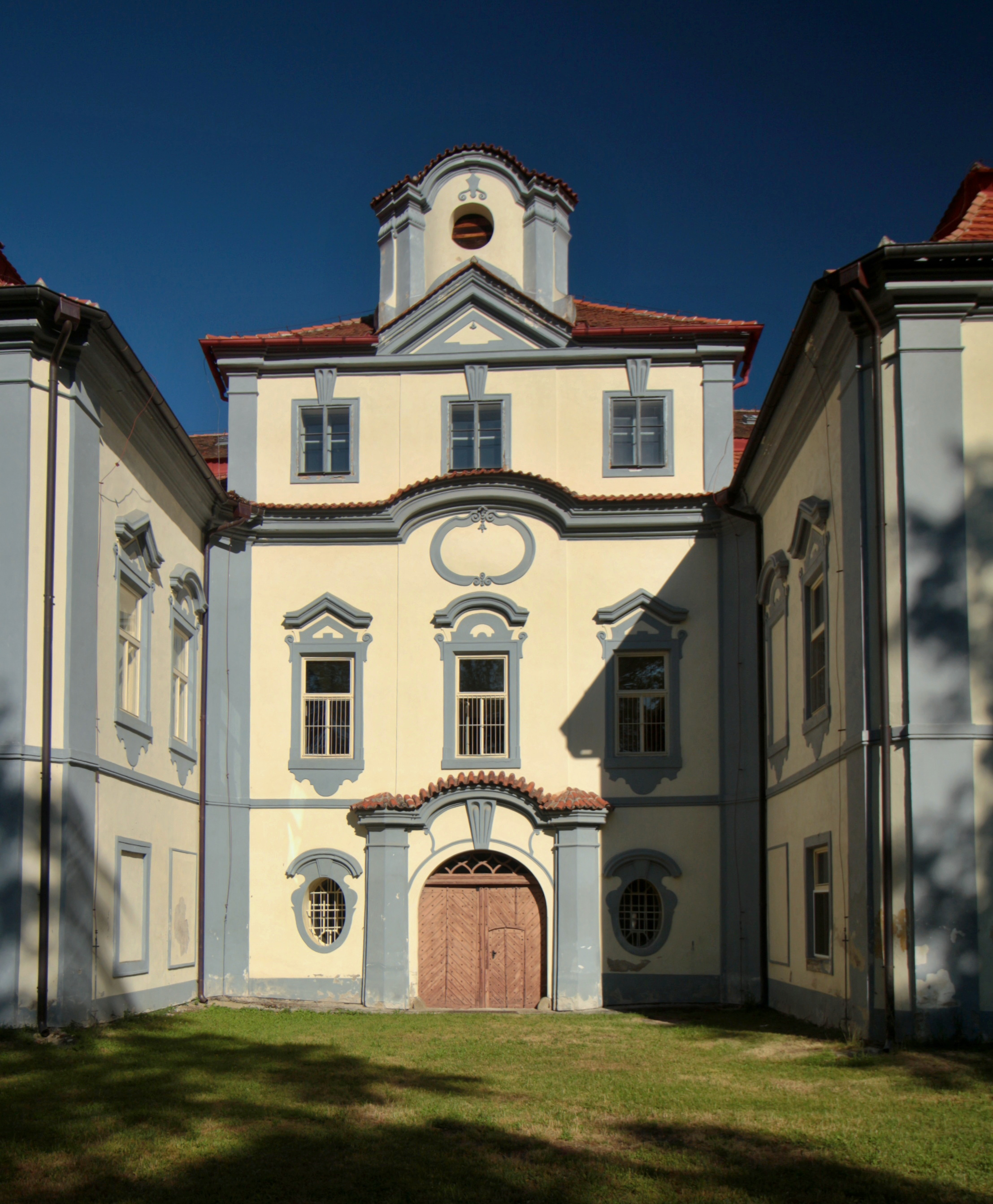 Přestavlky